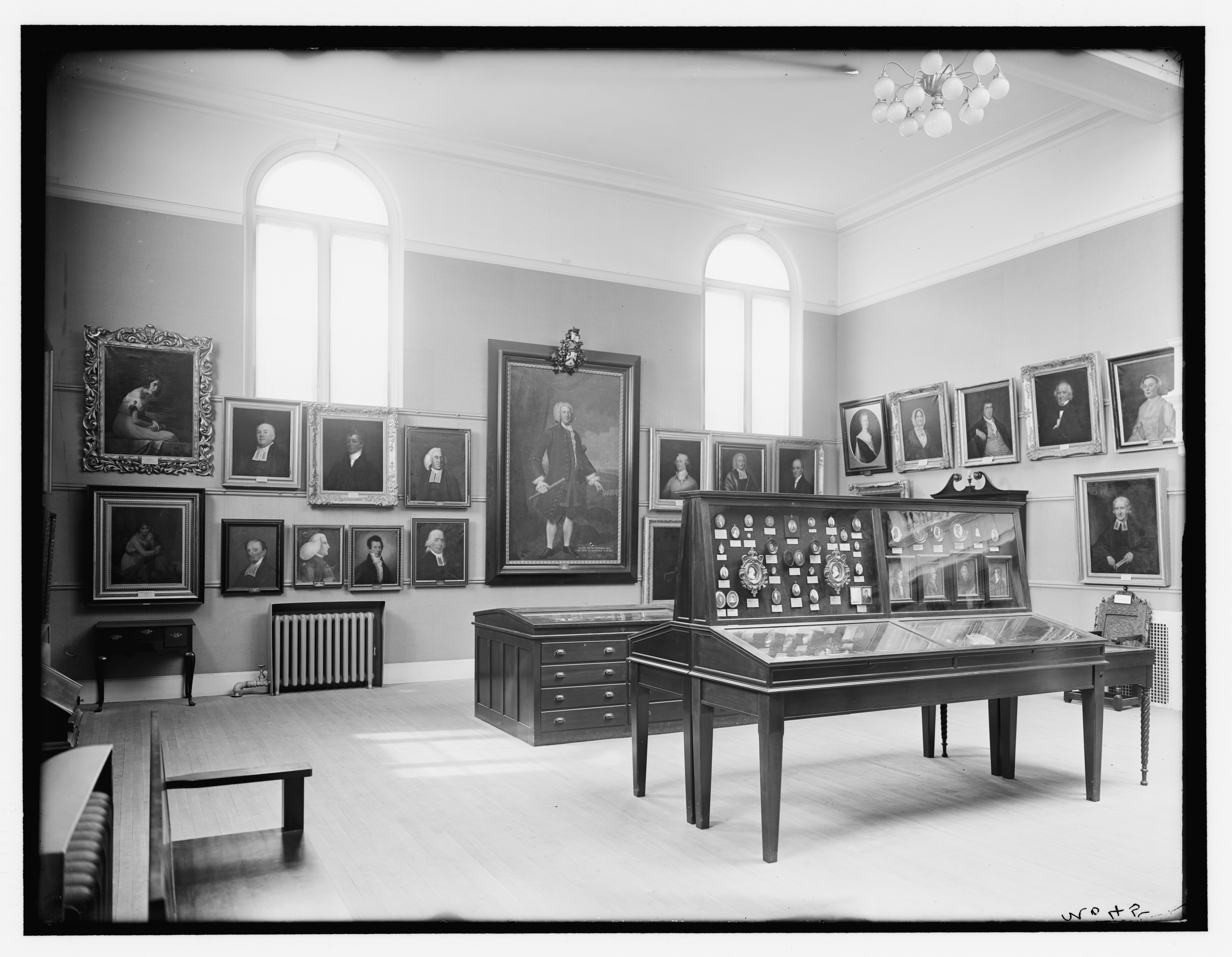 Essex Institute, Salem, Mass.